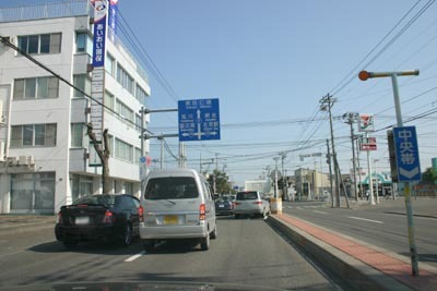 午前７時４０分、とん田通り